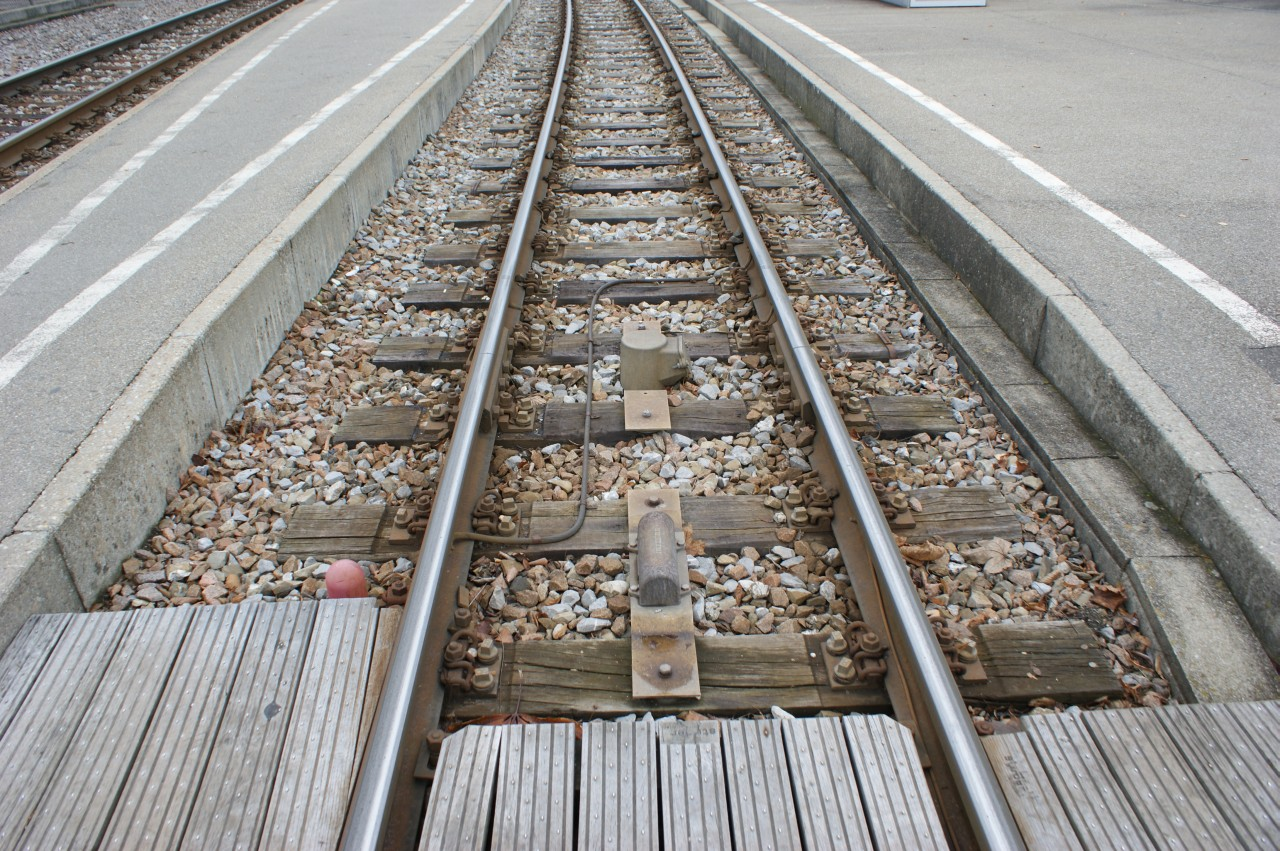 Zugsicherungsmagnete des Systems ZST-90 (Zugstop) in der ASm-Station Nidau